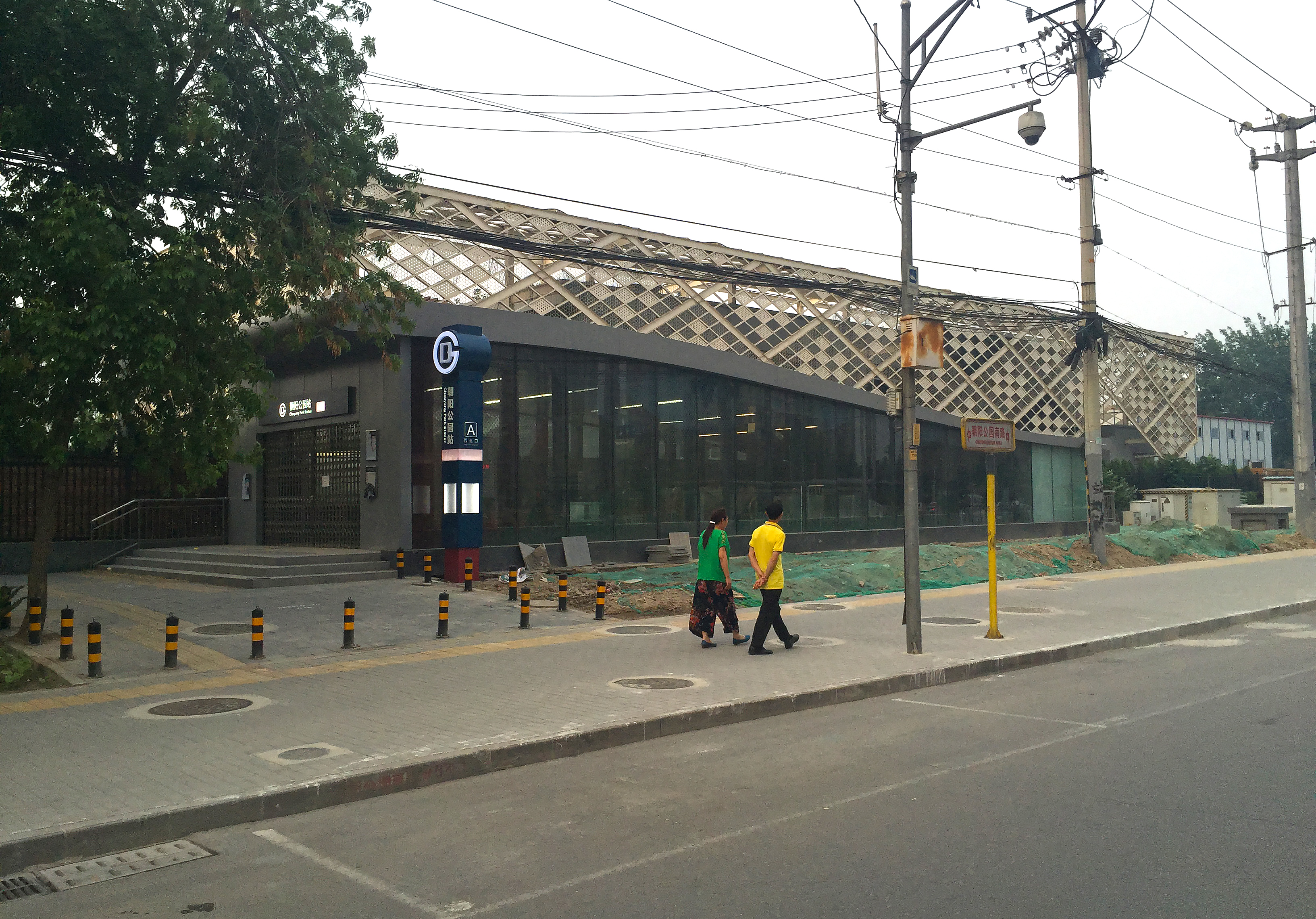 朝阳公园站A口，拍摄自甜水园街北口公交站